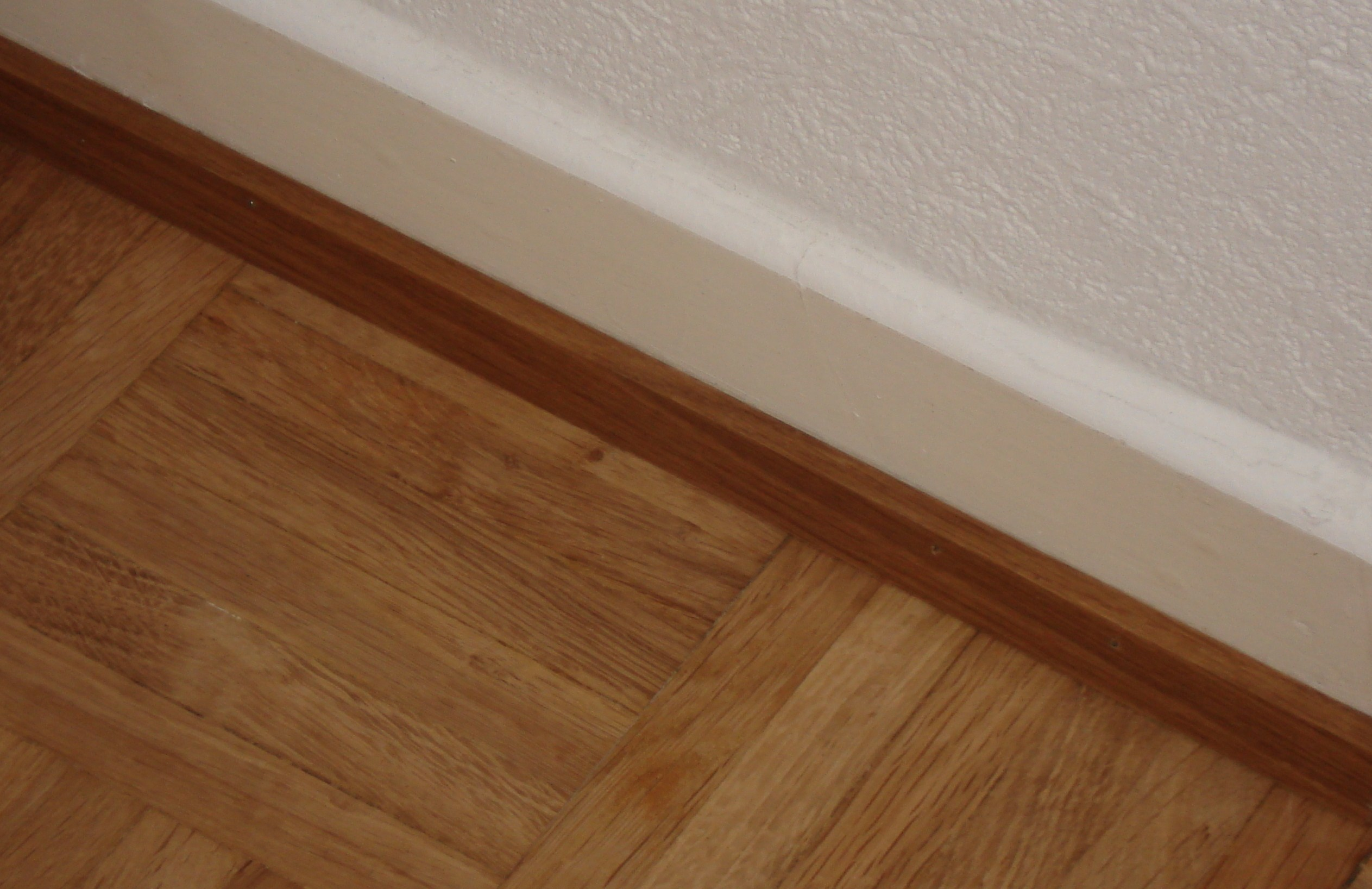 Eine Fußleiste aus Holz, weiß lackiert. Unterer Teil in Natur.